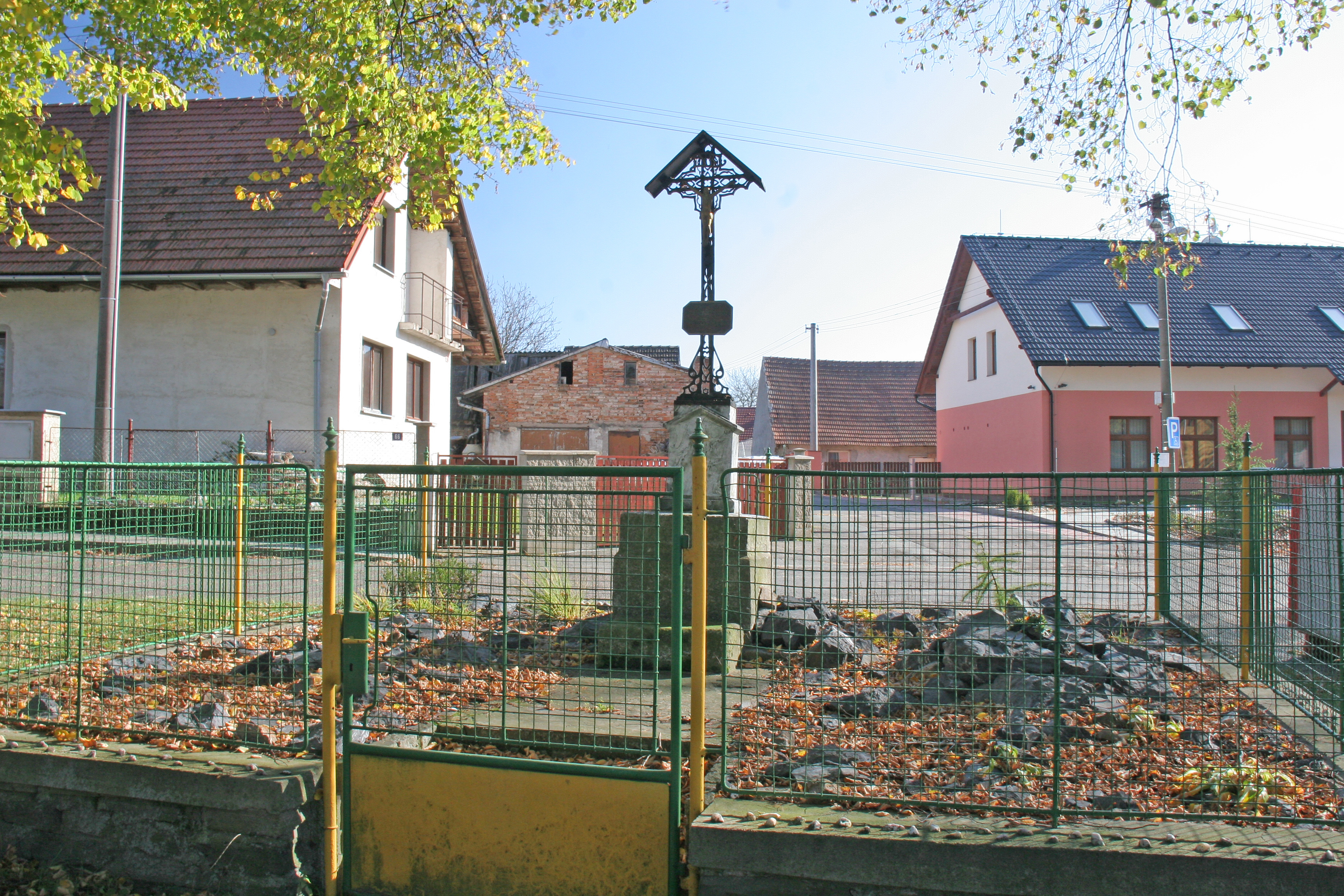 Bousov křížek